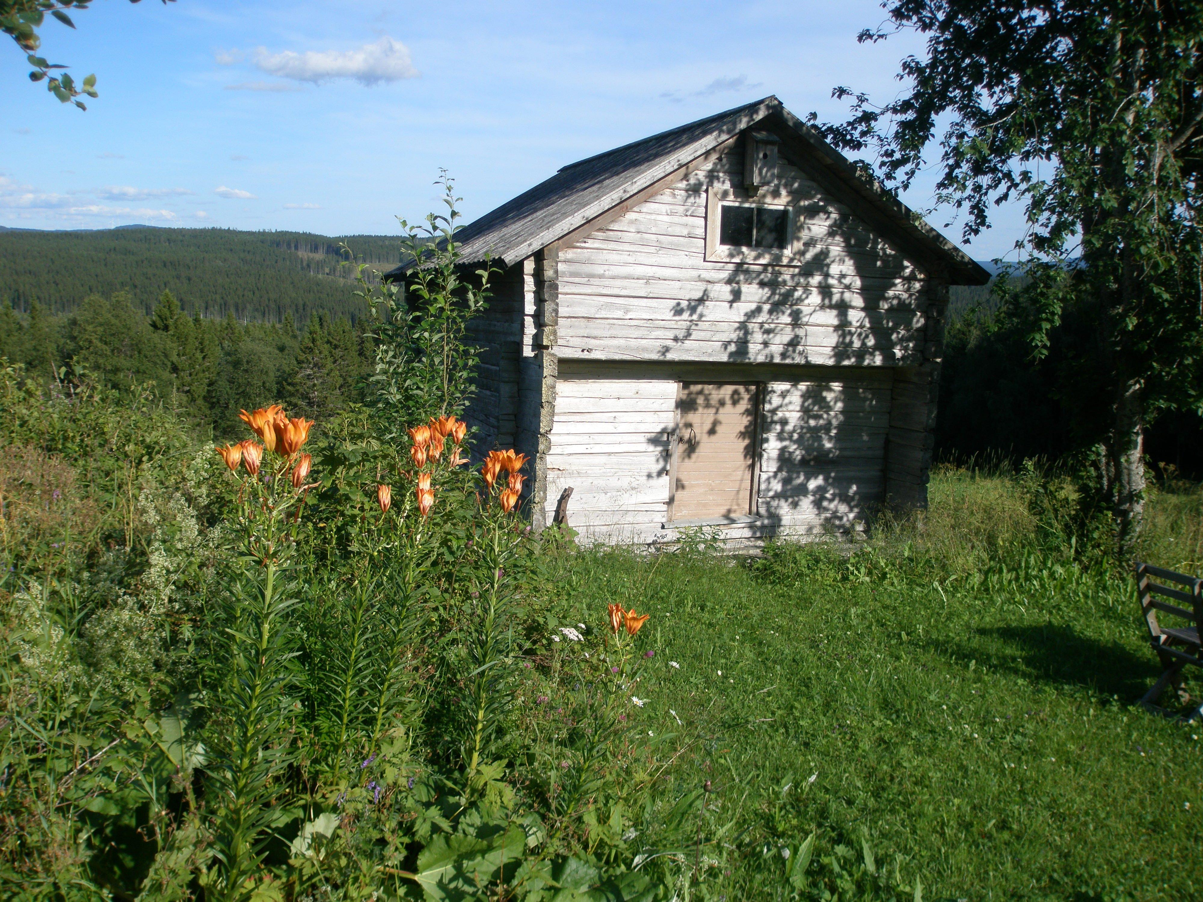 LappNilstorpet i Önet, Offerdals socken, Krokoms kommun, Jämtland, Sverige.